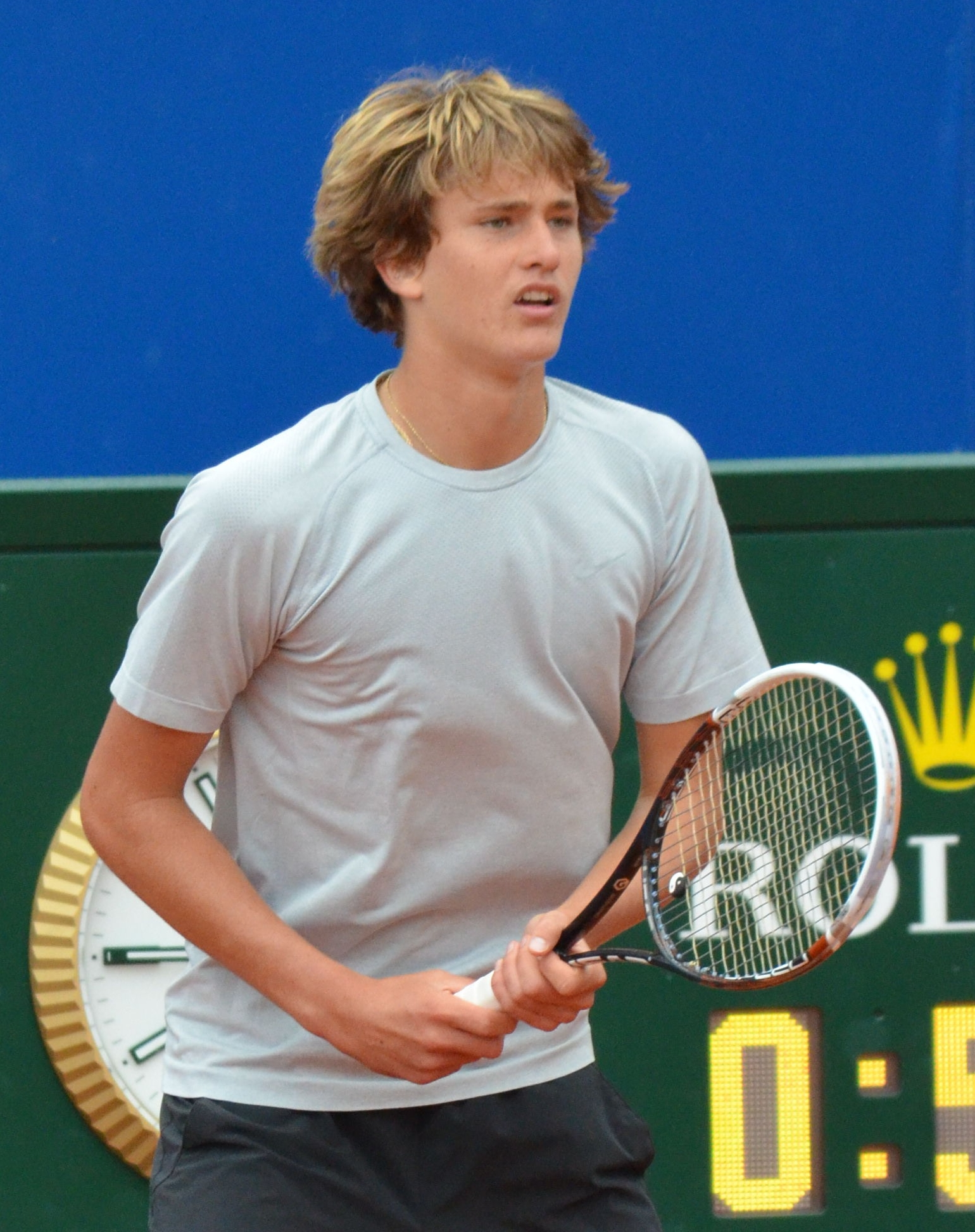 Alexander Zverev in der Begegnung gegen Jürgen Melzer bei den BMW Open 2014